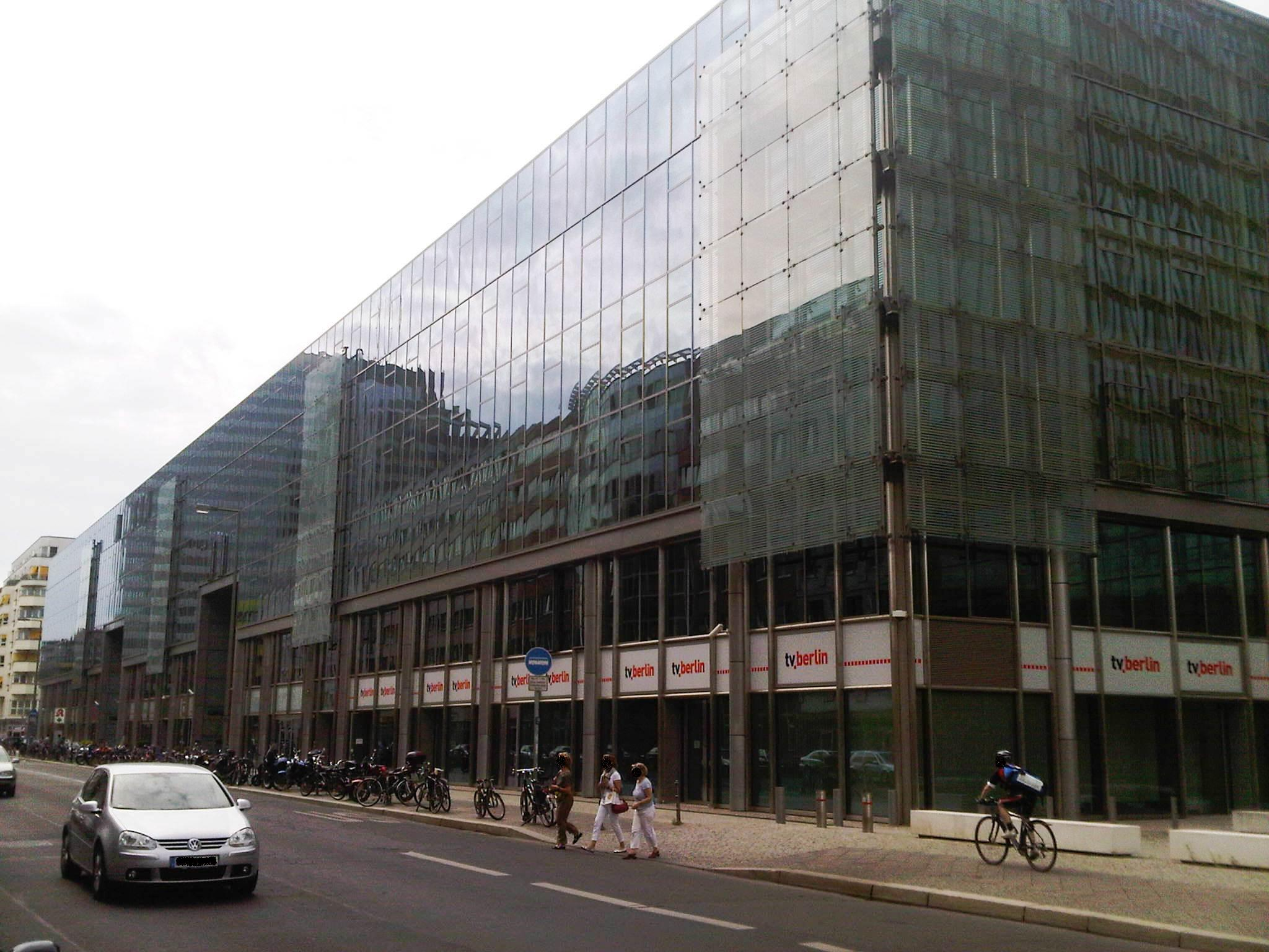 Südseite der Axel-Springer-Passage mit Blick von der Rudi-Dutschke-Straße auf das Gebäude in Berlin-Kreuzberg (Deutschland)